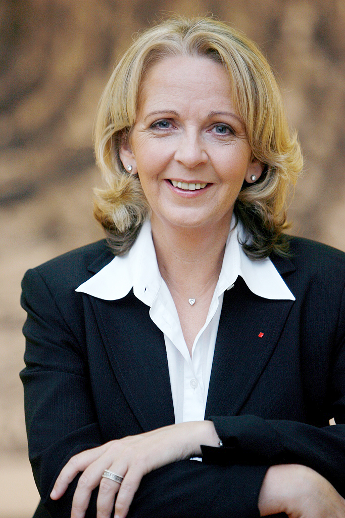 Hannelore Kraft, Landesvorsitzende der NRW-SPD